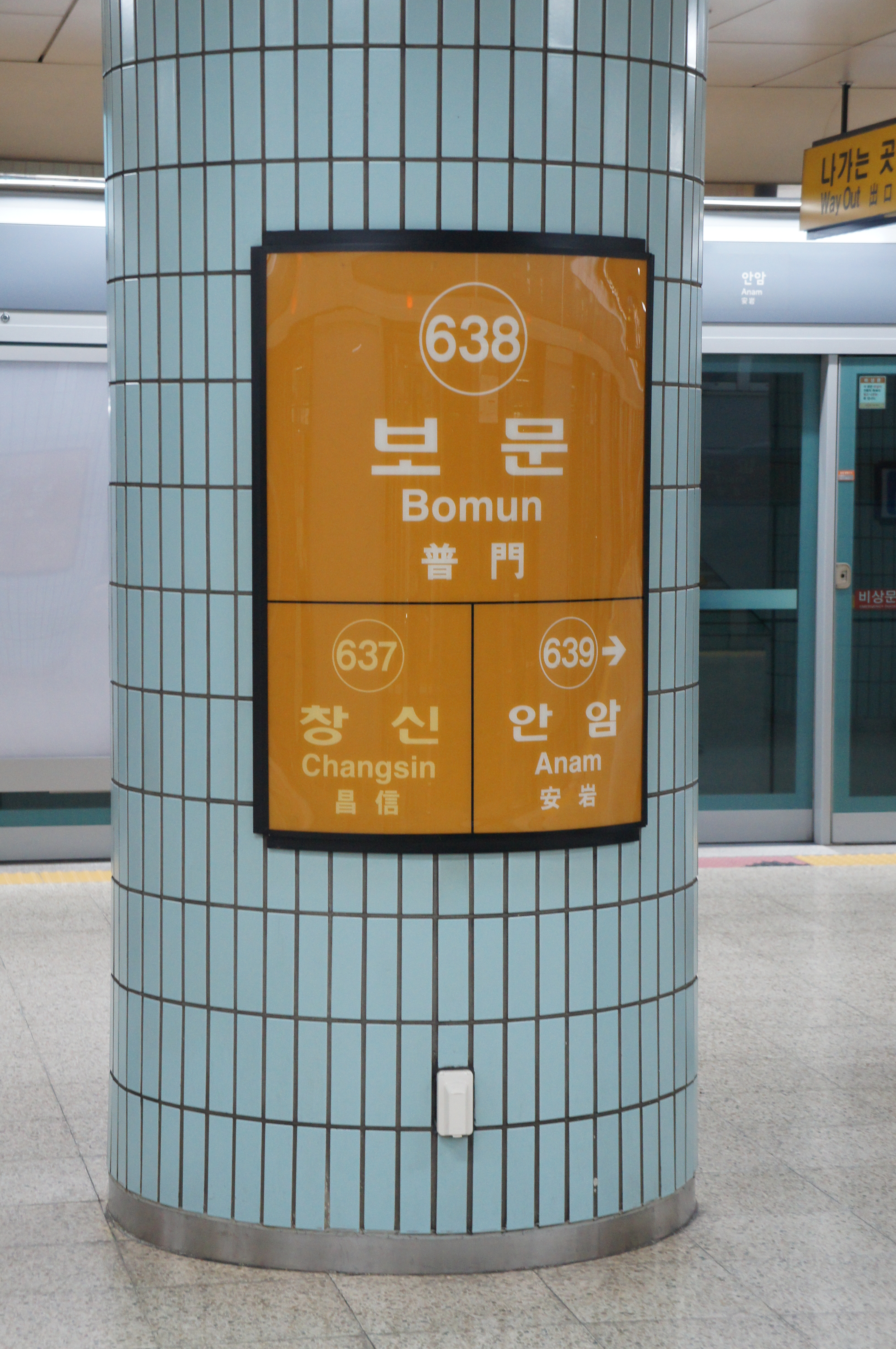 보문역 역명판